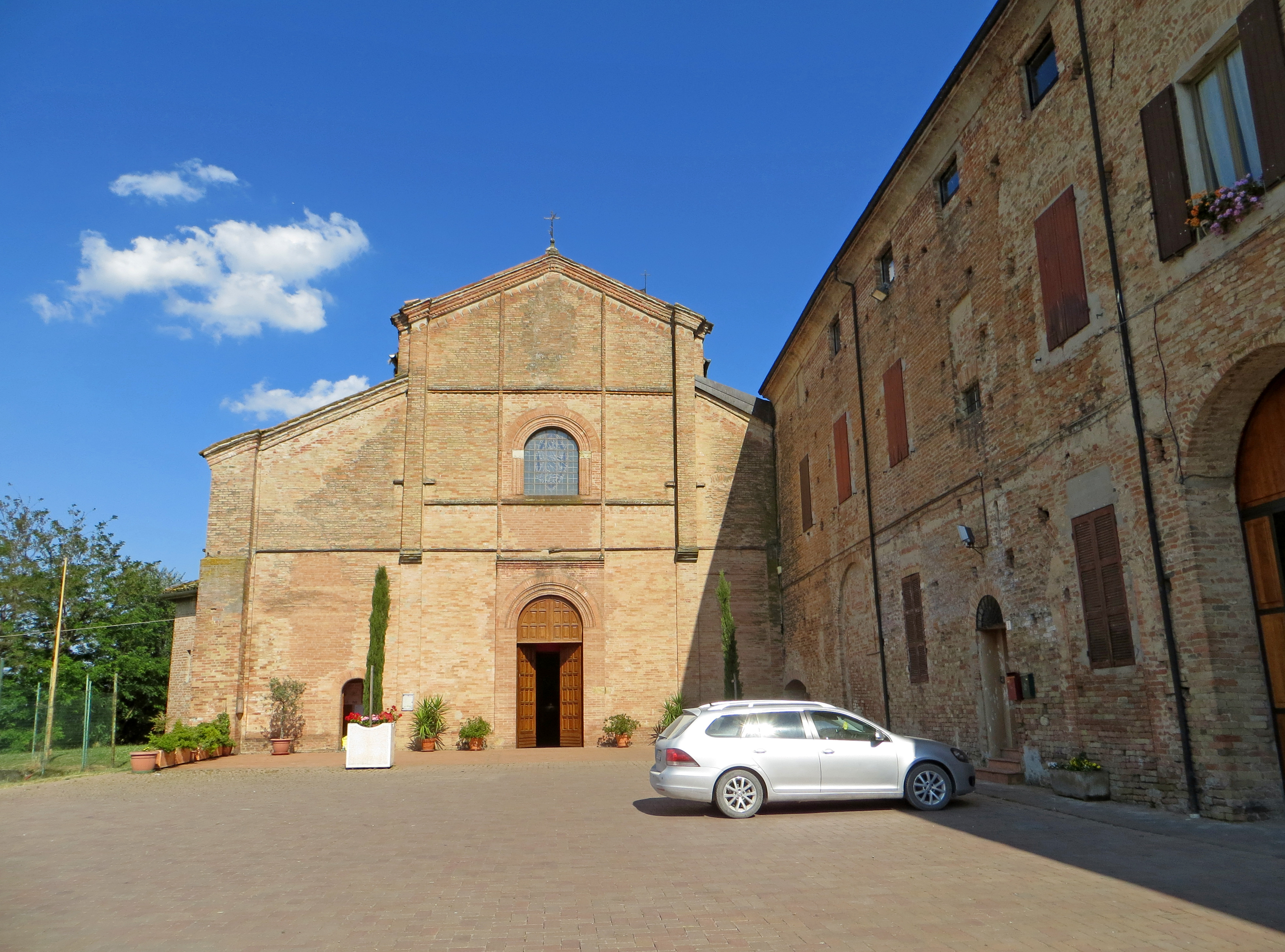 Monastero di Santa Maria Assunta (Castione Marchesi, Fidenza) - facciata della chiesa